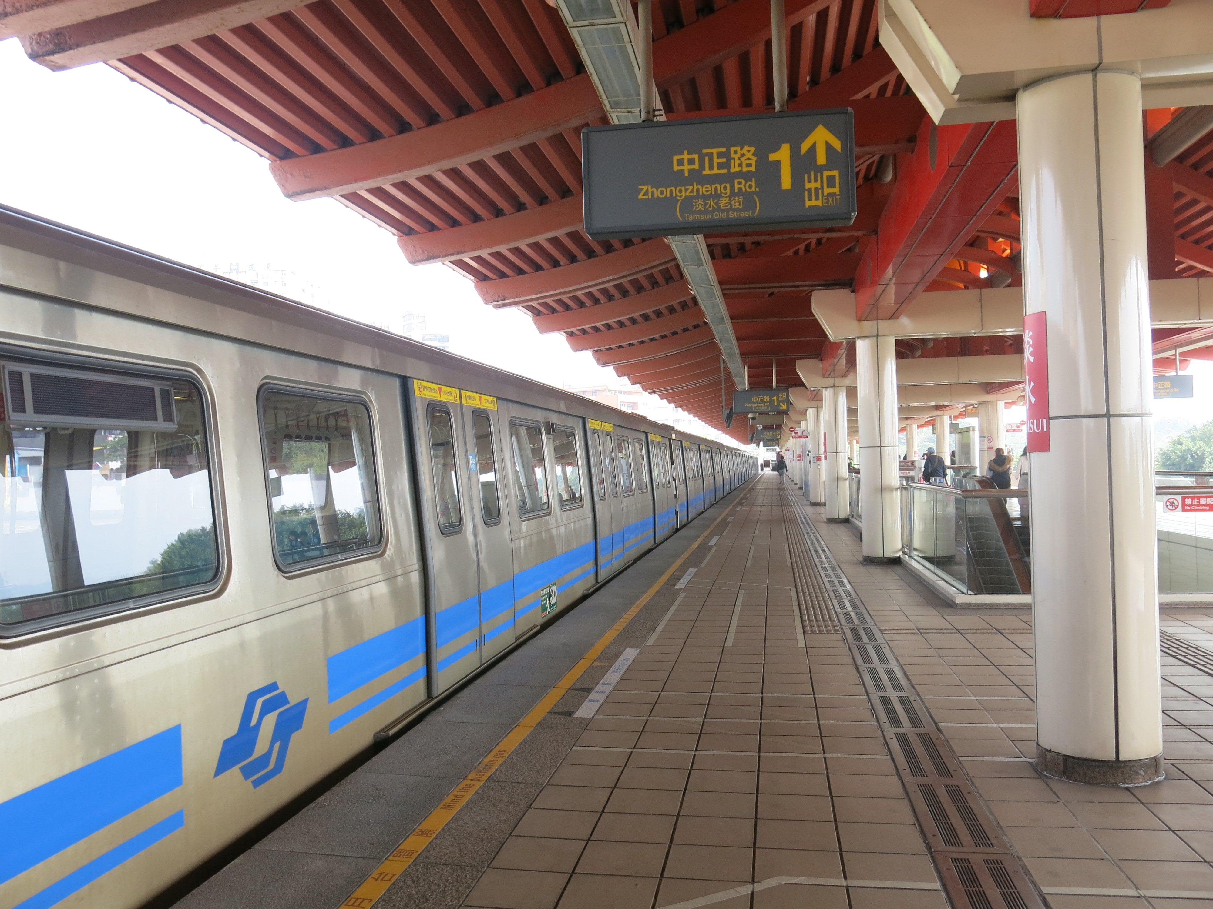 中文（台灣）: 台北捷運淡水站月台